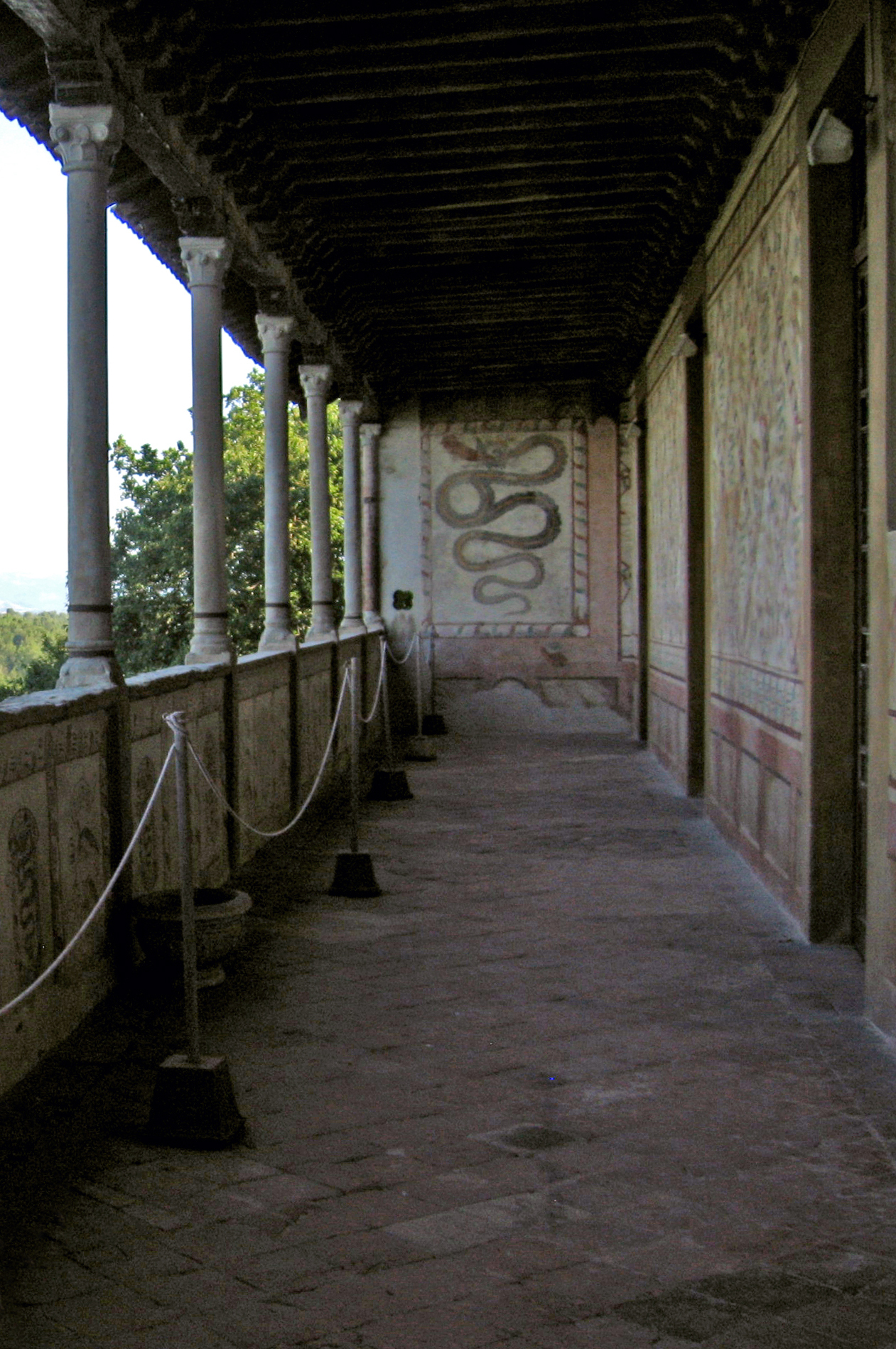 Castello di Montechiarugolo (loggiato)